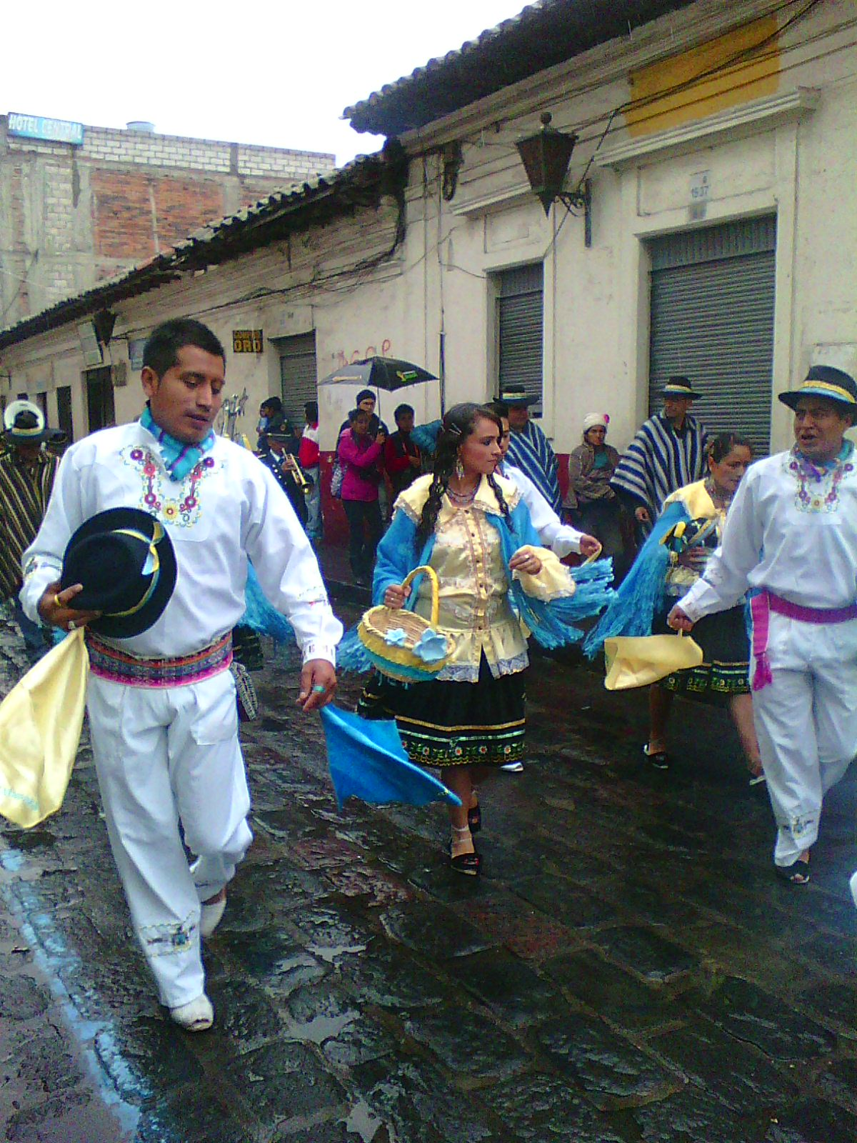 Comparsa latacungueña